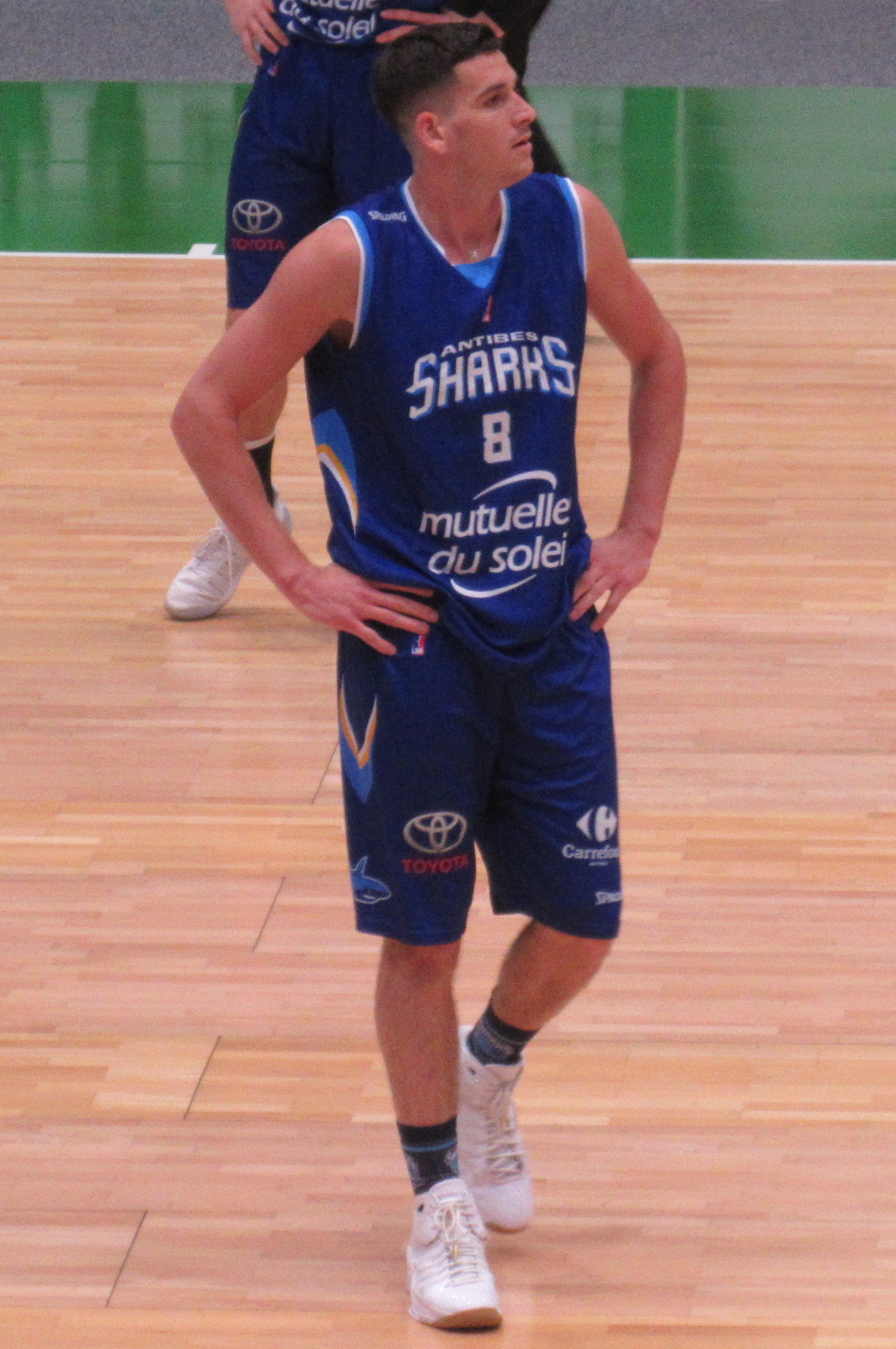 Frédéric Bourdillon avec le maillot d'Antilles